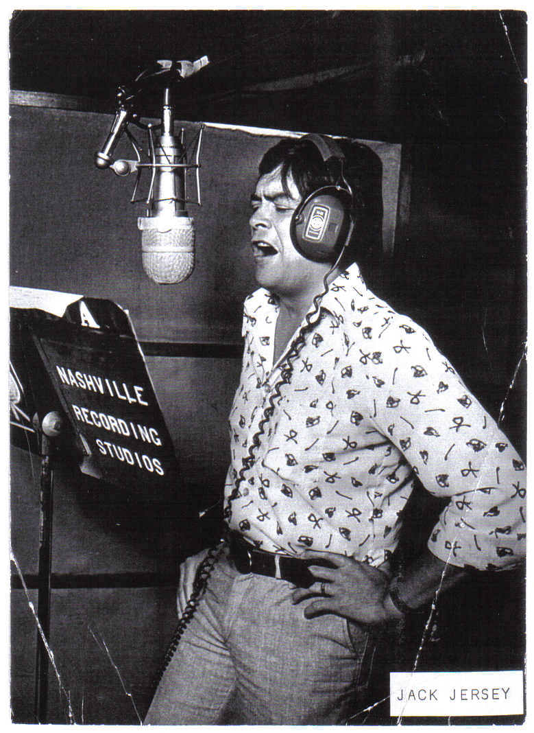 Recording album in Nashville Studios with the Jordanaires